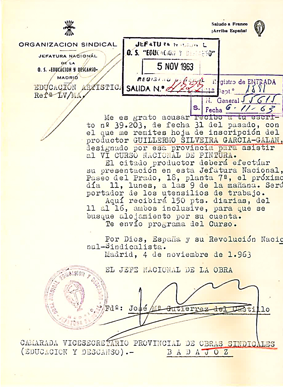 Expediente VI Curso Nacional de Orientación y Especialización Artística de la Obra Sindical de EyD. doc. 03.